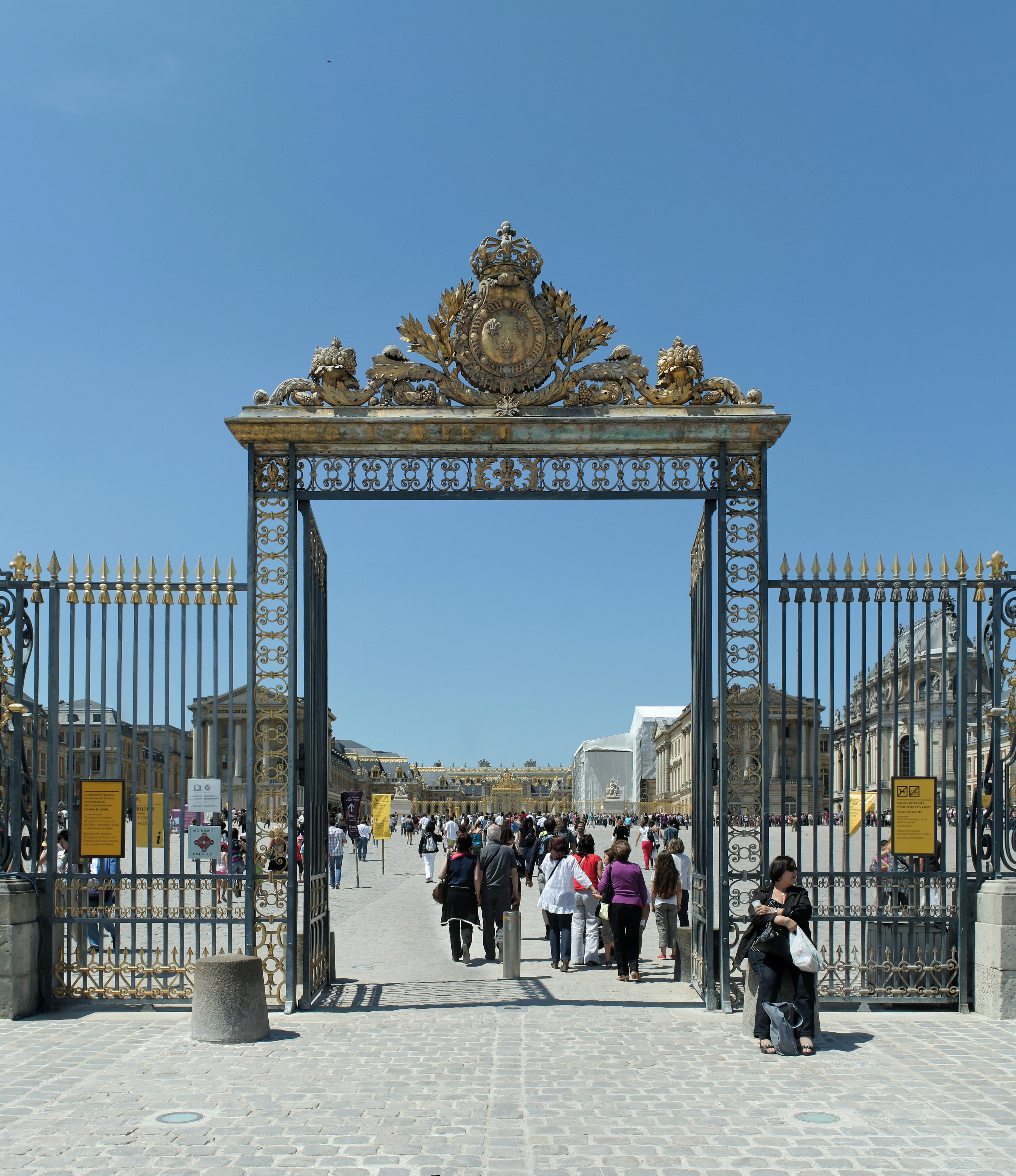 Château de Versailles, grille d'Honneur, portail.